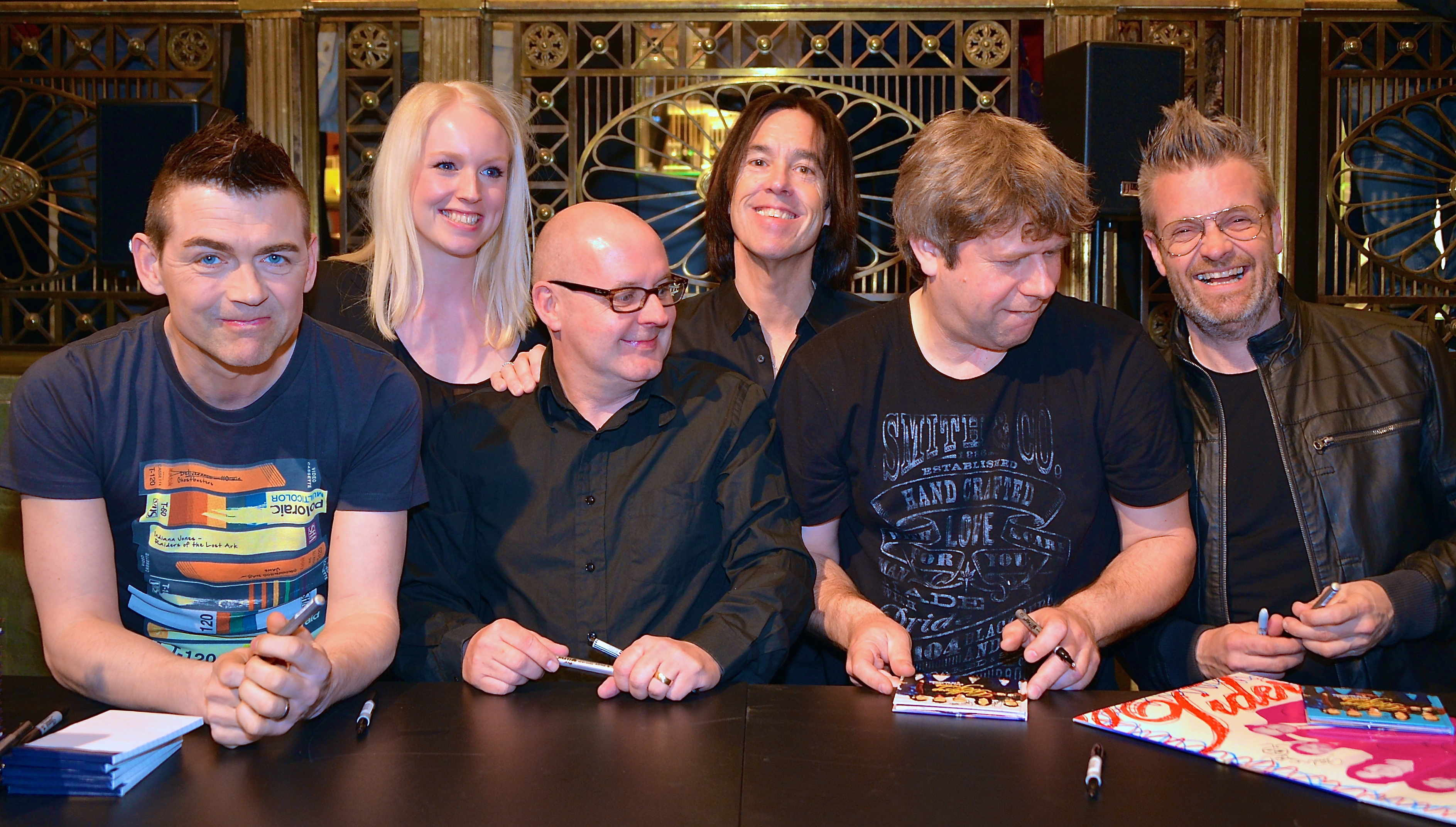 Gyllene Tider signerar sin senaste platta "Dags att tänka på refrängen" på NK i Stockholm den 26 april 2013.